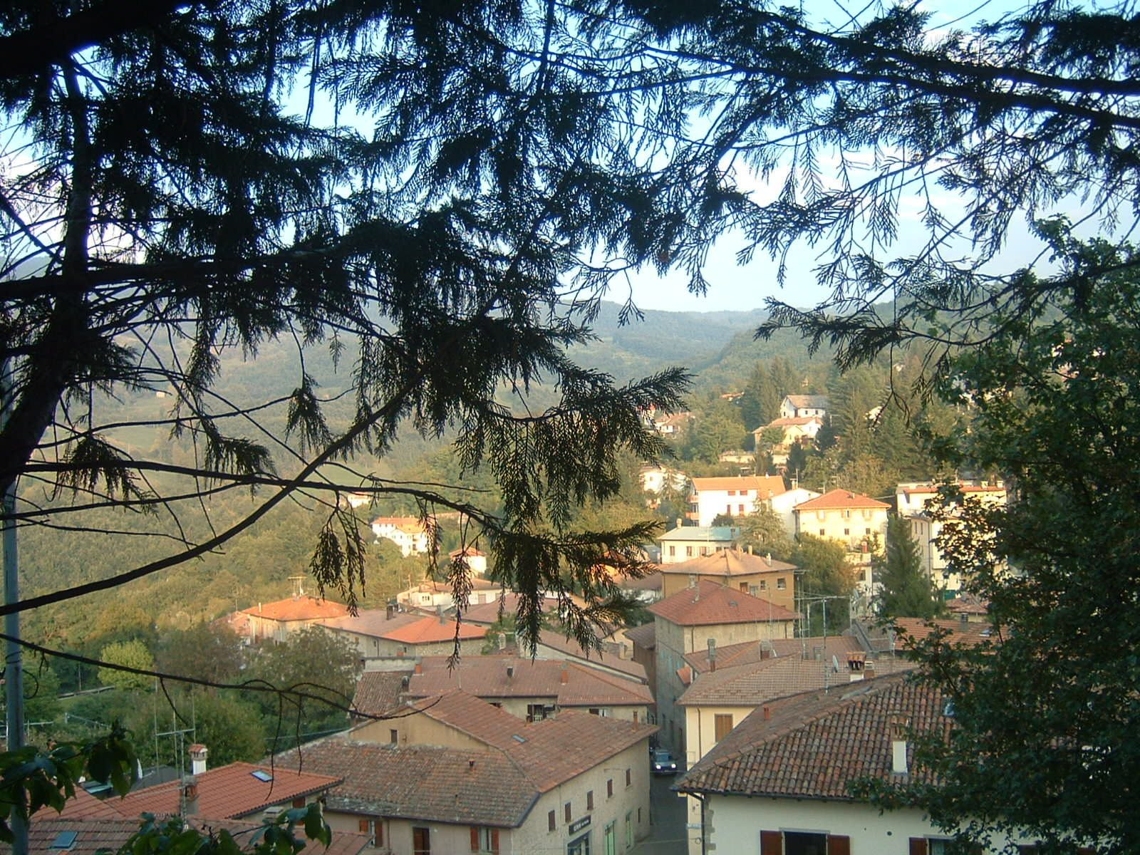 View of Pian del Voglio, Bologna (ITA)